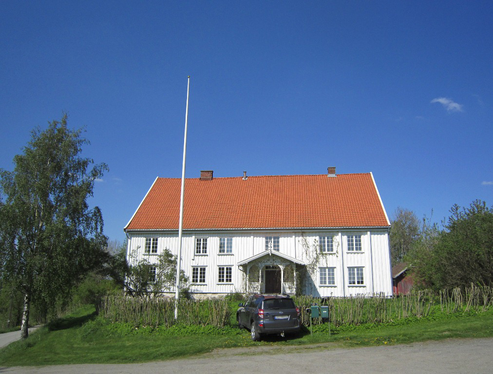 Hobøl prestegård